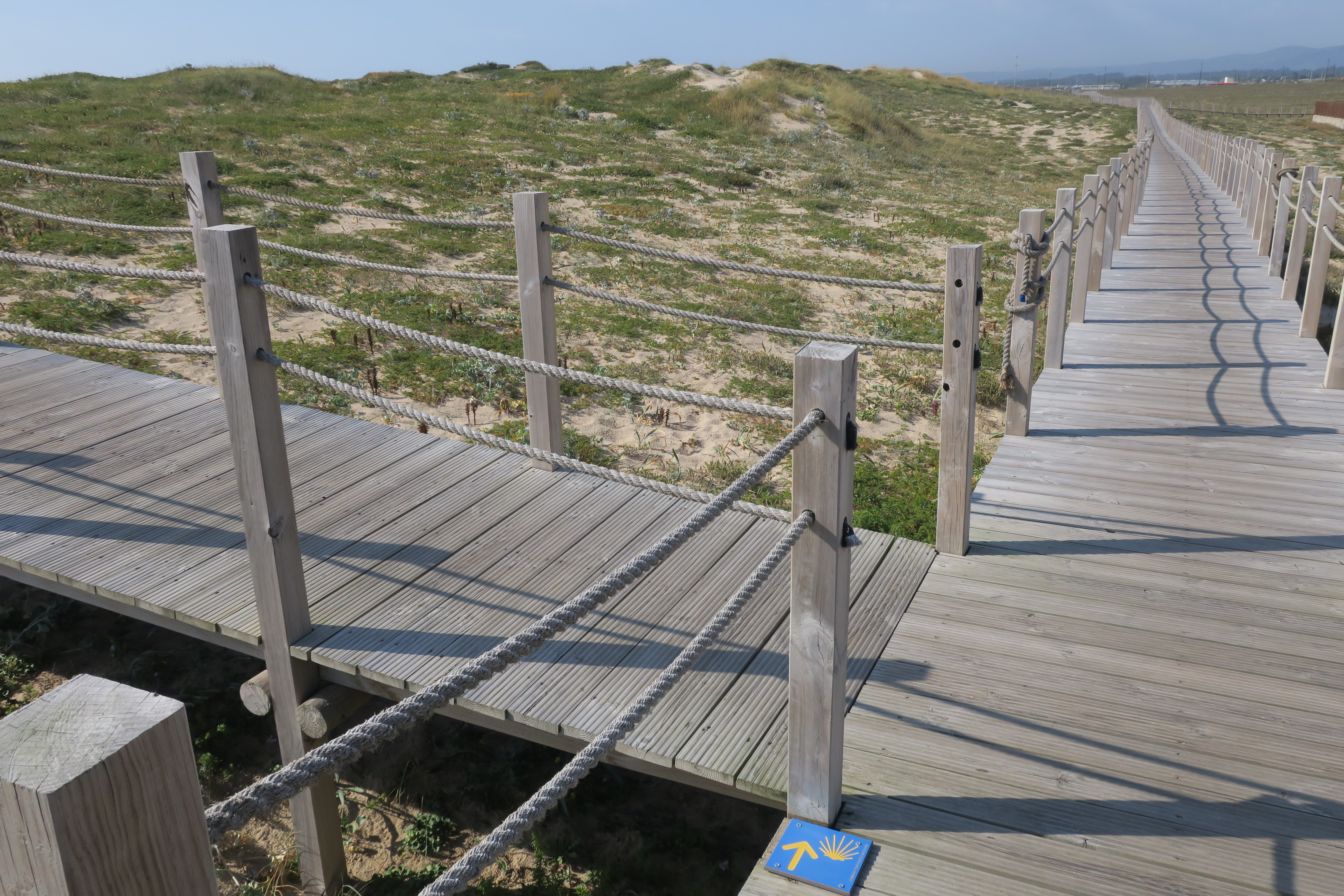 Caminho da Costa Aguçadoura, Póvoa de Varzim.